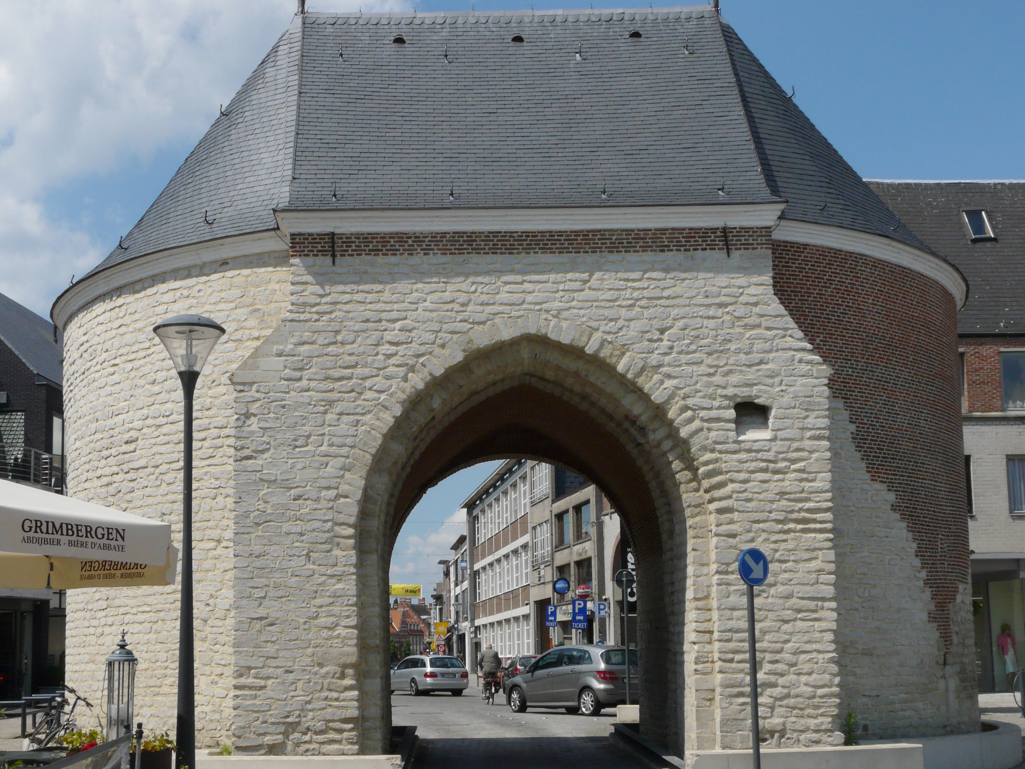 Stadspoort in Herentals